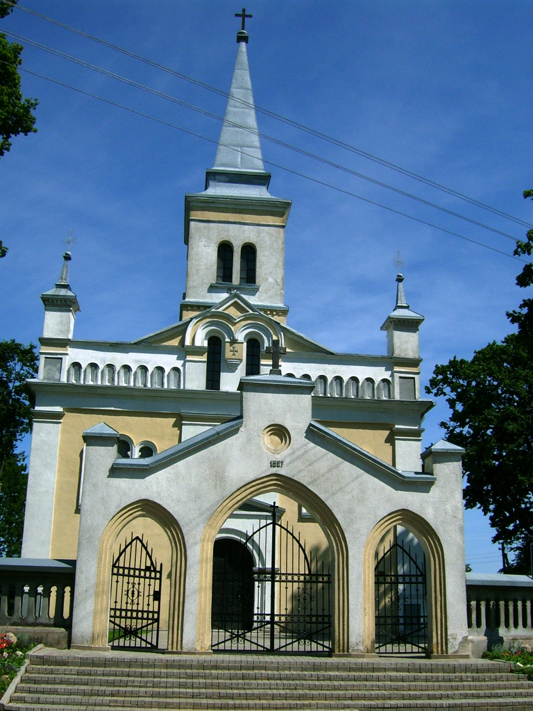 Žygaičių Šv. apaštalų Petro ir Pauliaus bažnyčia